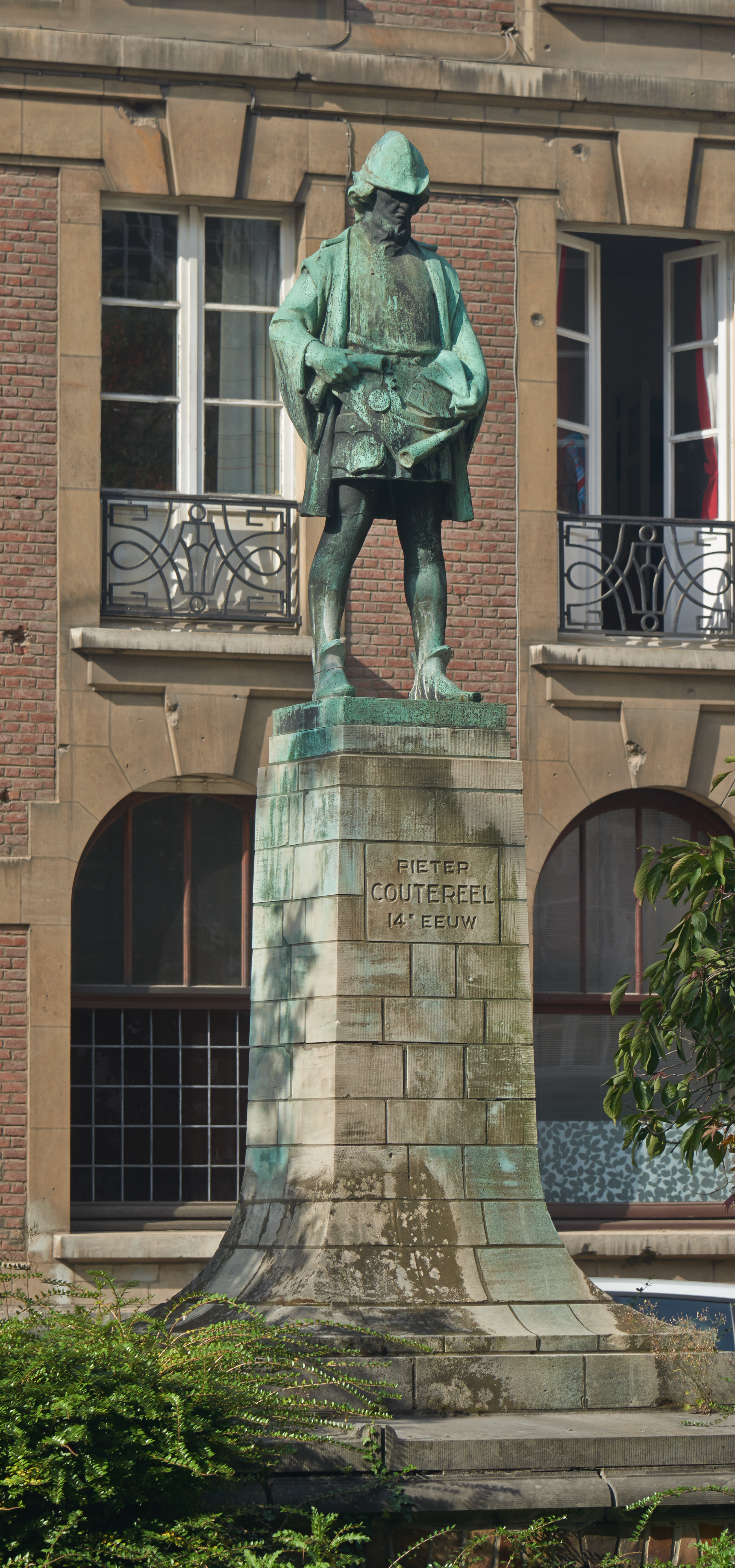 Leuven, Ferdinand Smoldersplein, Standbeeld van Pieter Coutereel